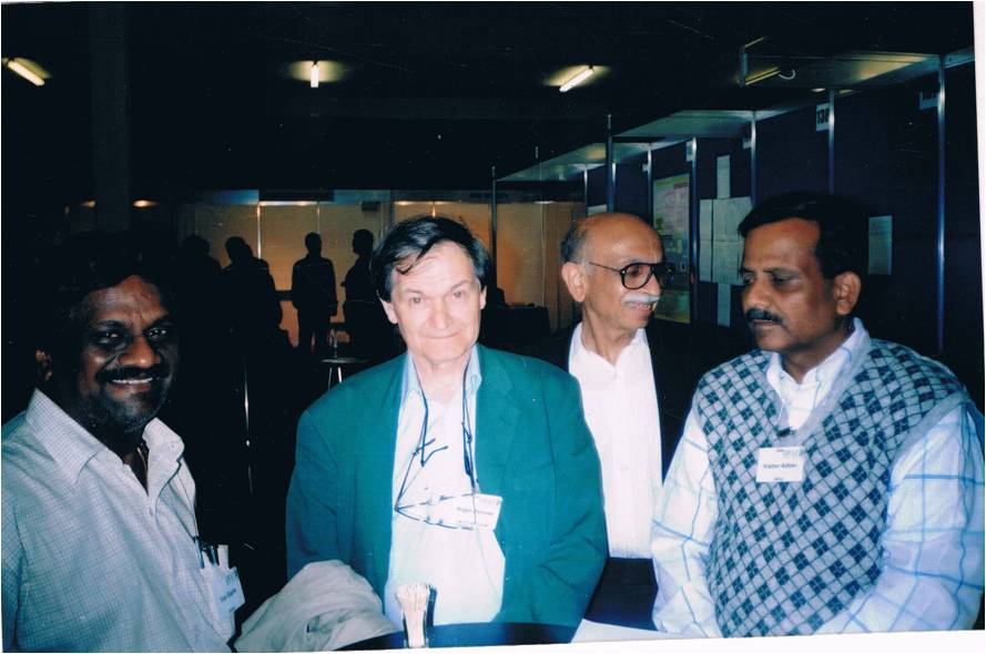 ప్రముఖ శాస్త్రవేత్త పెన్‌రోజ్ తో ఎస్.ఎన్.పి.గుప్తా